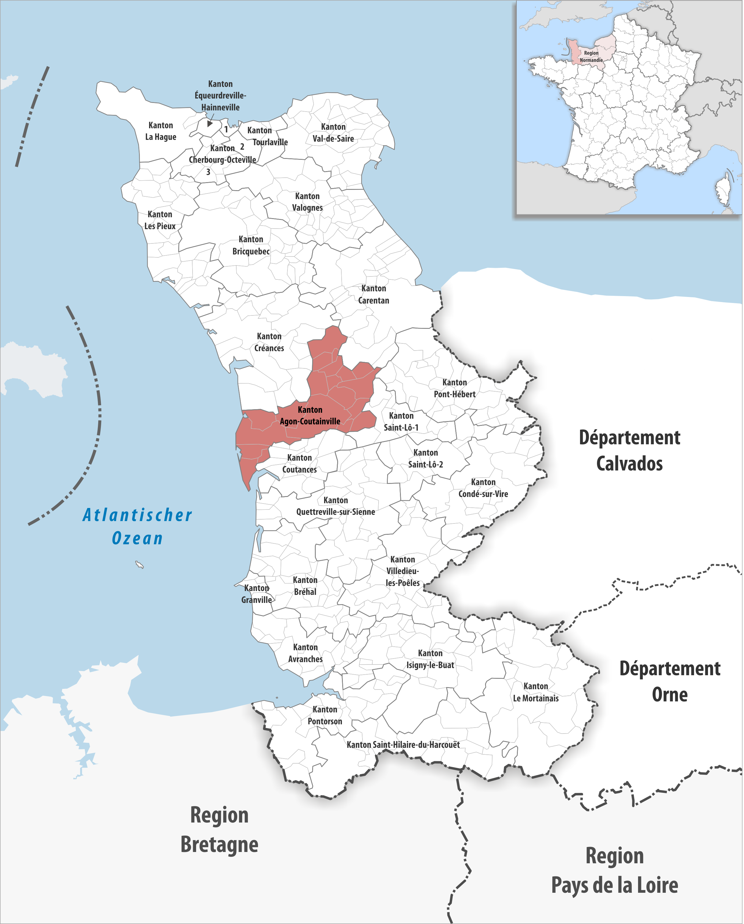 Lage des Kantons Agon-Coutainville